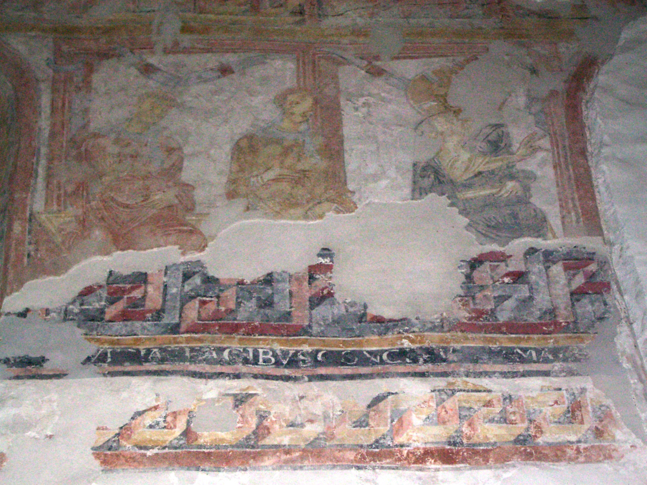 Überlingen, Germany: Kapelle St. Sylvester in Goldbach